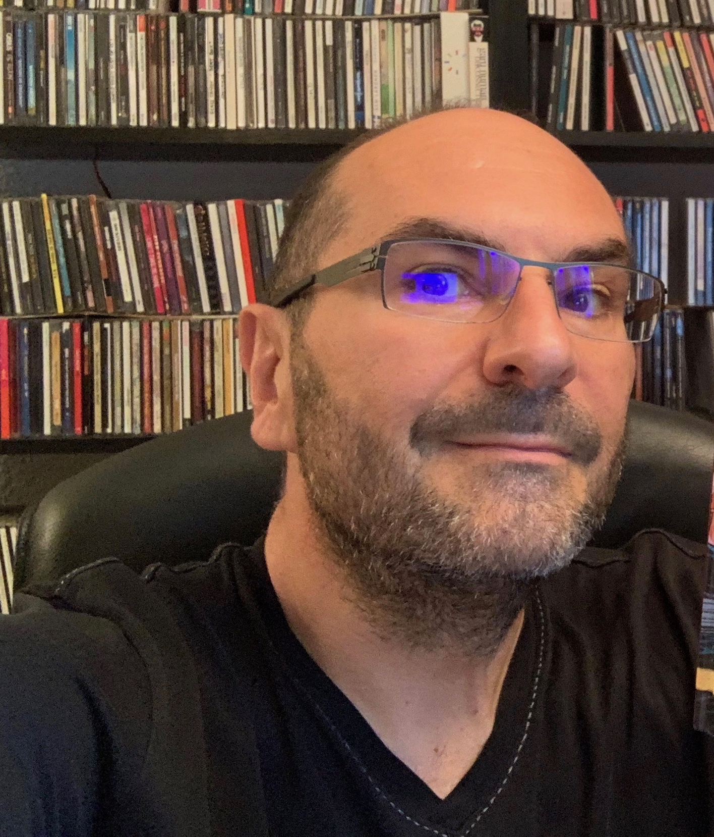 2019, lancement de la maison d'édition Drakoo avec comme premier titre Danthrakon.